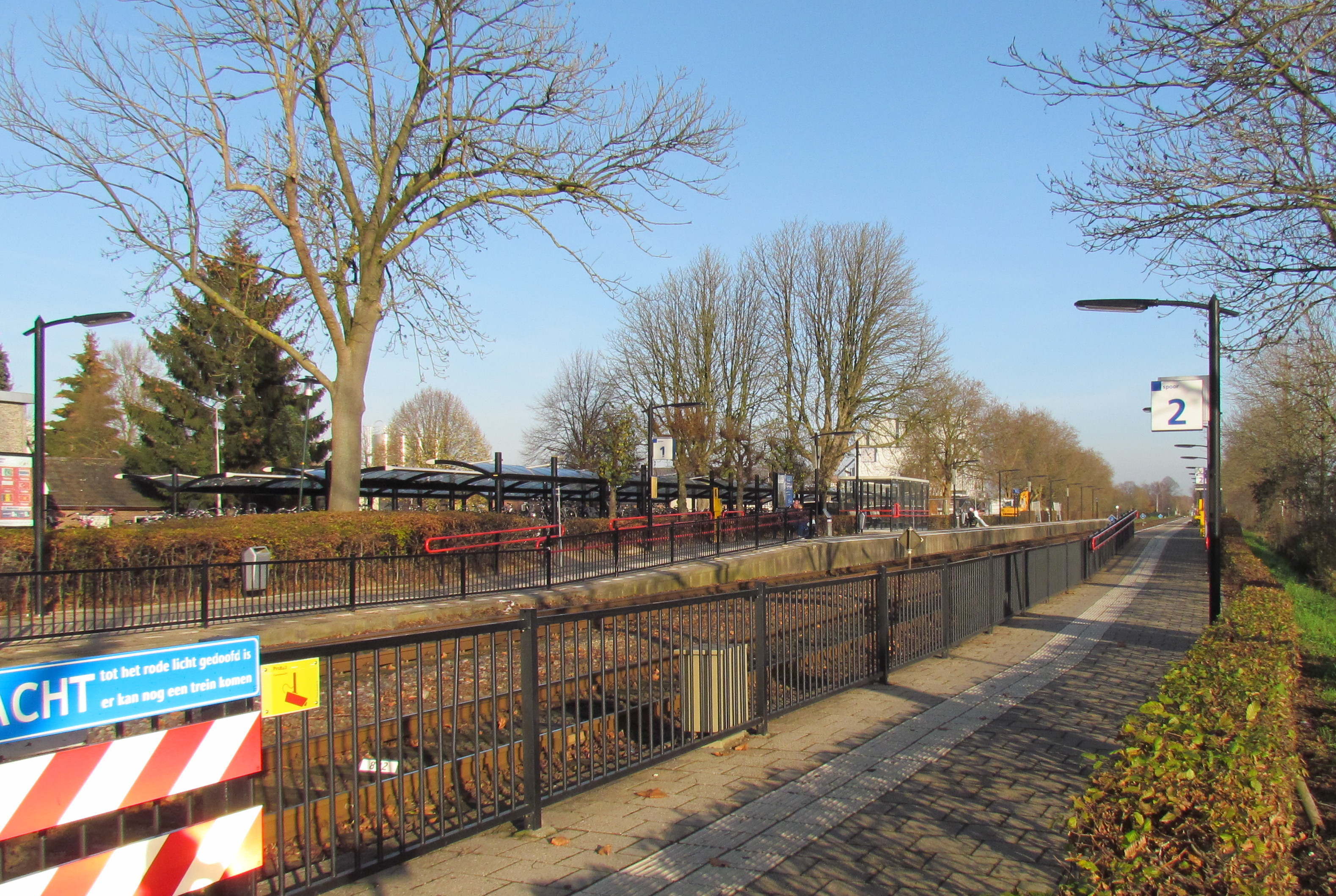 Station Didam, Gelderland, NL